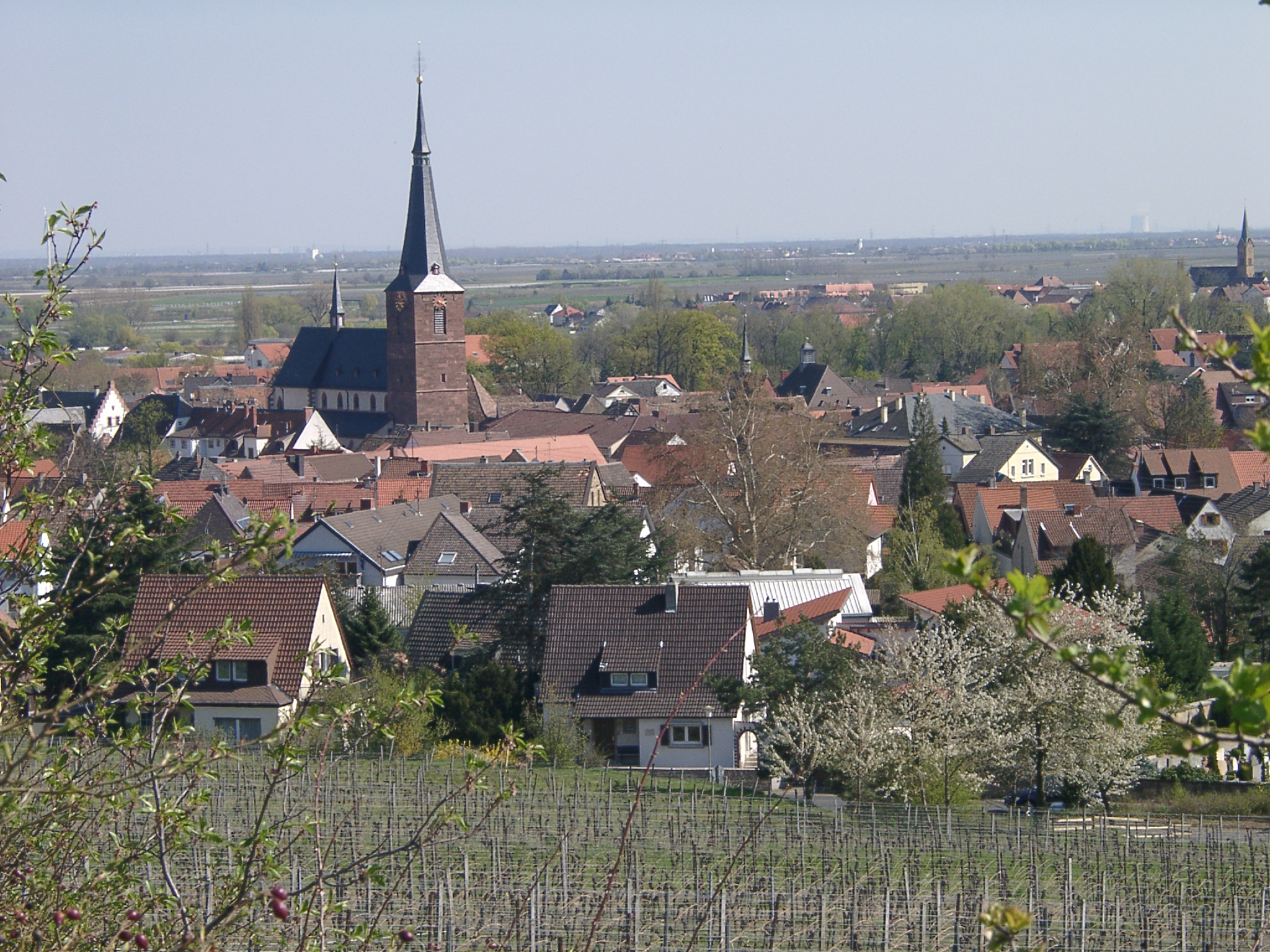 Deidesheim, von der Haardt fotografiert, aus der Weinlage Langenmorgen